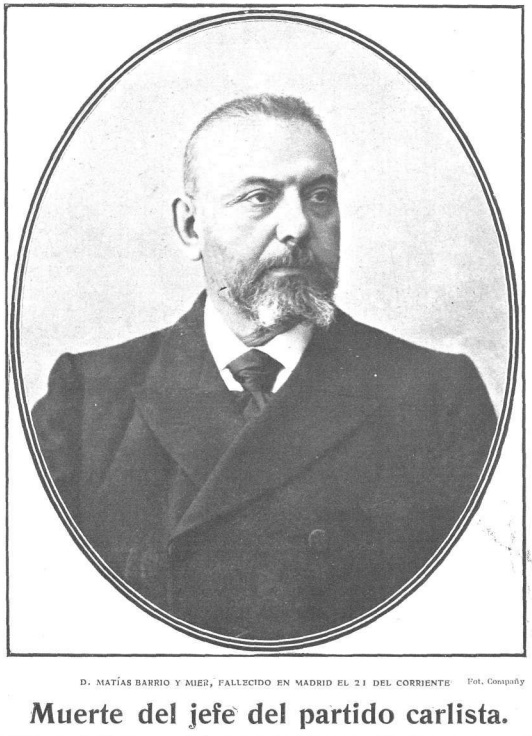 Matías Barrio y Mier, de Compañy.